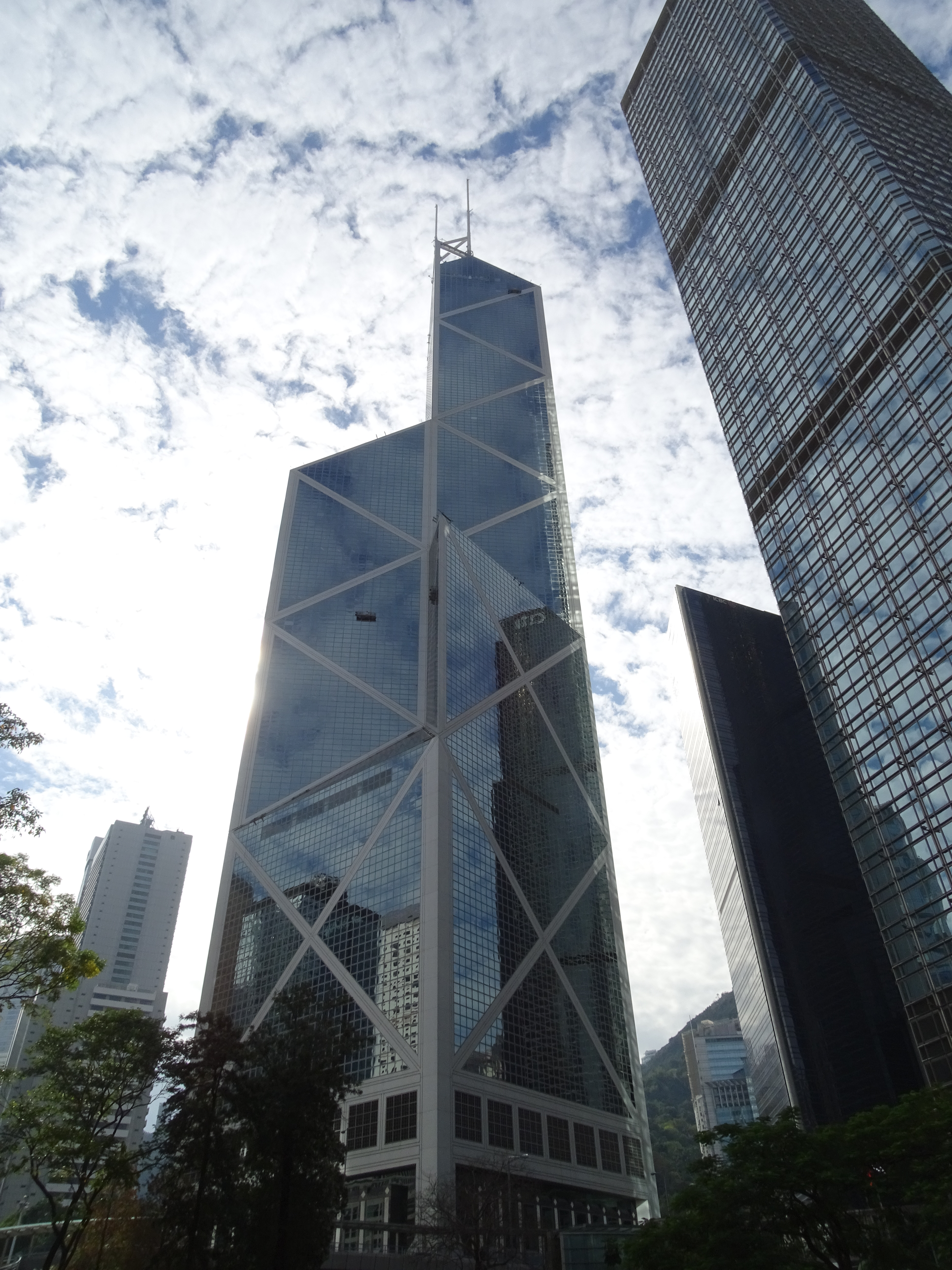 Bank of China Tower (rechts teilweise das Cheung Kong Center), Central and Western District of Hong Kong Island, Hong Kong